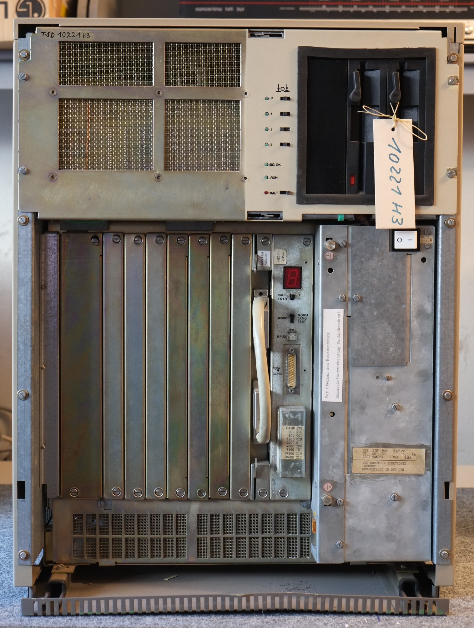 Ansicht des K1822 von vorn mit abgenommener Frontblende